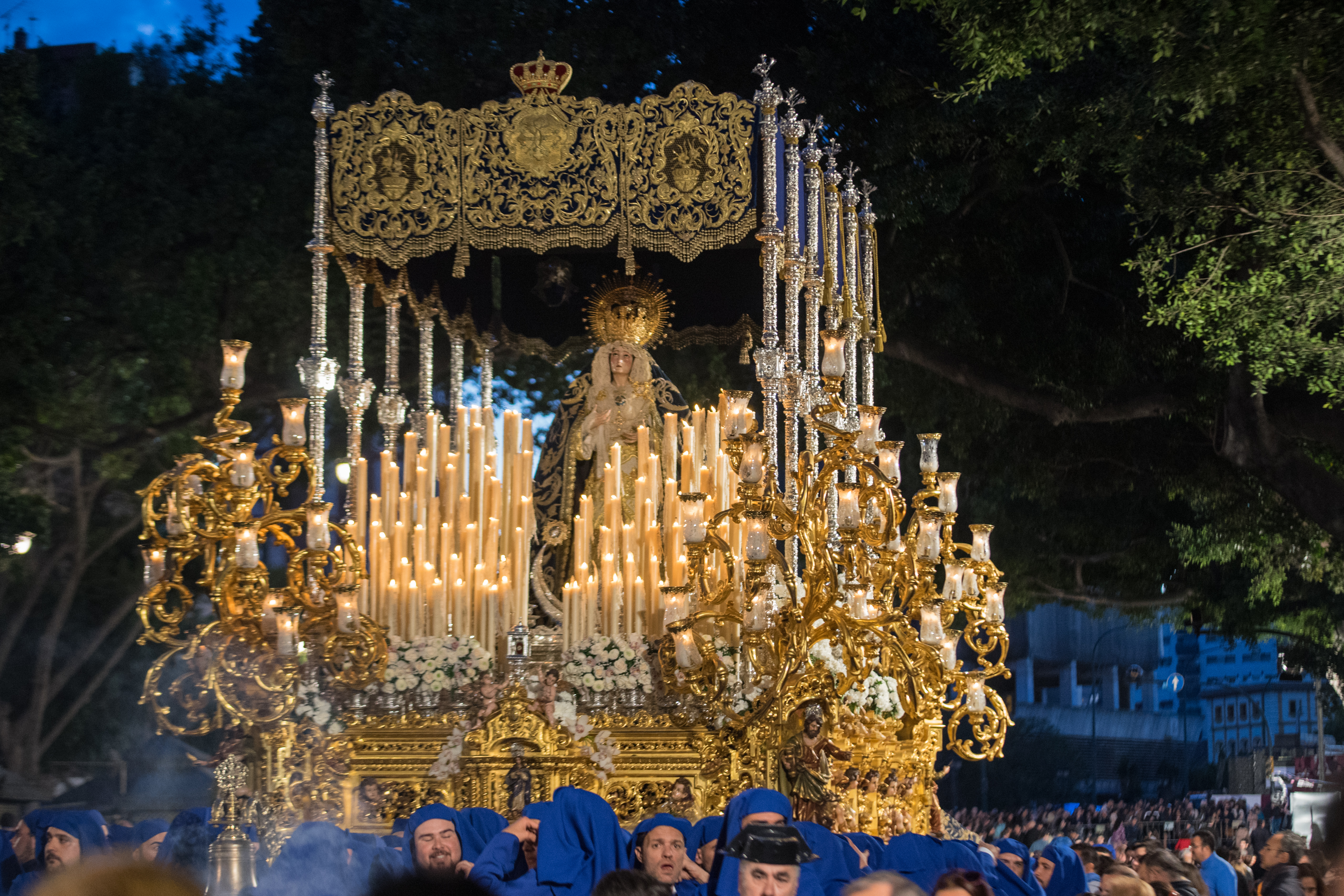 Trono de la Concepción de la Pontificia, Muy Ilustre y Venerable Archicofradía Sacramental y Seráfica de Nuestro Padre Jesús Orando en el Huerto, Nuestra Señora de la Concepción, San Juan Evangelista y Nuestra Señora de la Oliva This is a photography of a Folklore festival in Spain (Wikidata id Q9075883).